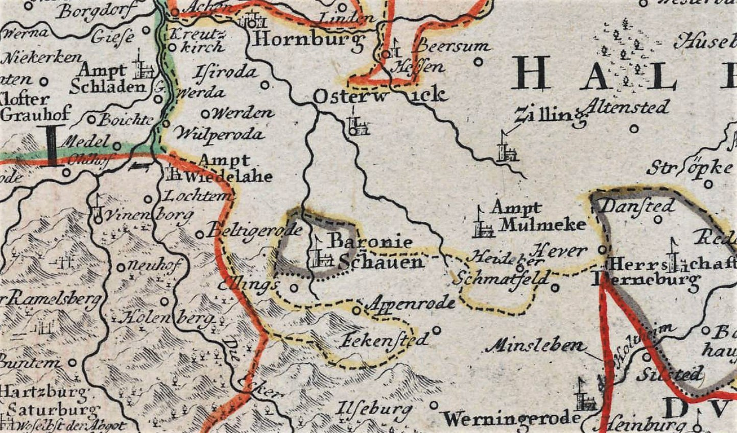 Herzogtum Braunschweig, Kartenausschnitt (Baronie Schauen) der Territorialkarte „Ducatus Brunsvicensis in tres suos principatus Calenbergicum sc. Grubenhag. et Guelpherbitanum“, 1725. Beschreibung: „5 dt. Meilen = 9,5 cm – 49 x 57 – farbiger Kupferstich: Johann Baptist Homann – B I Nr. 15“.